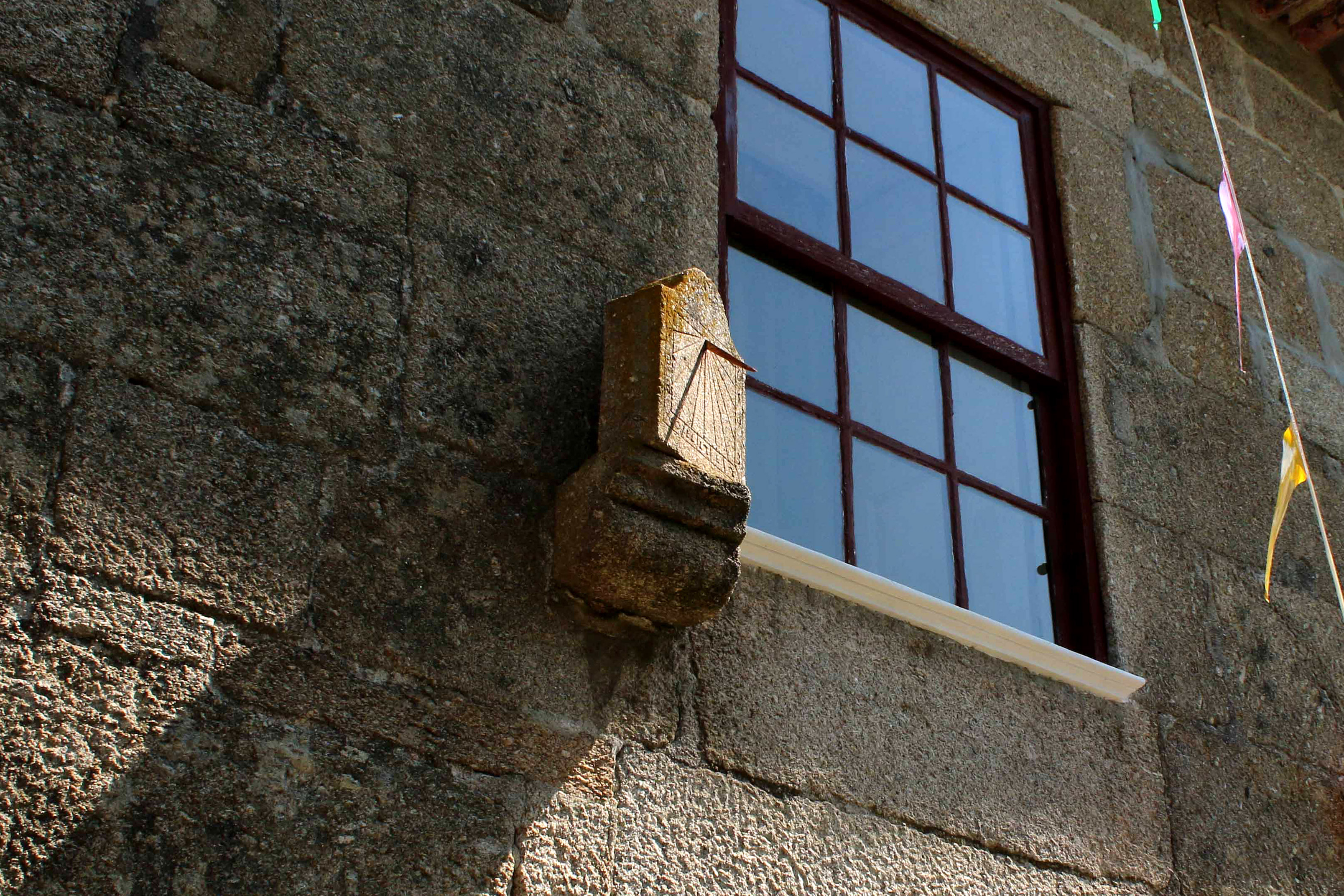 Relógio do Sol no centro da aldeia